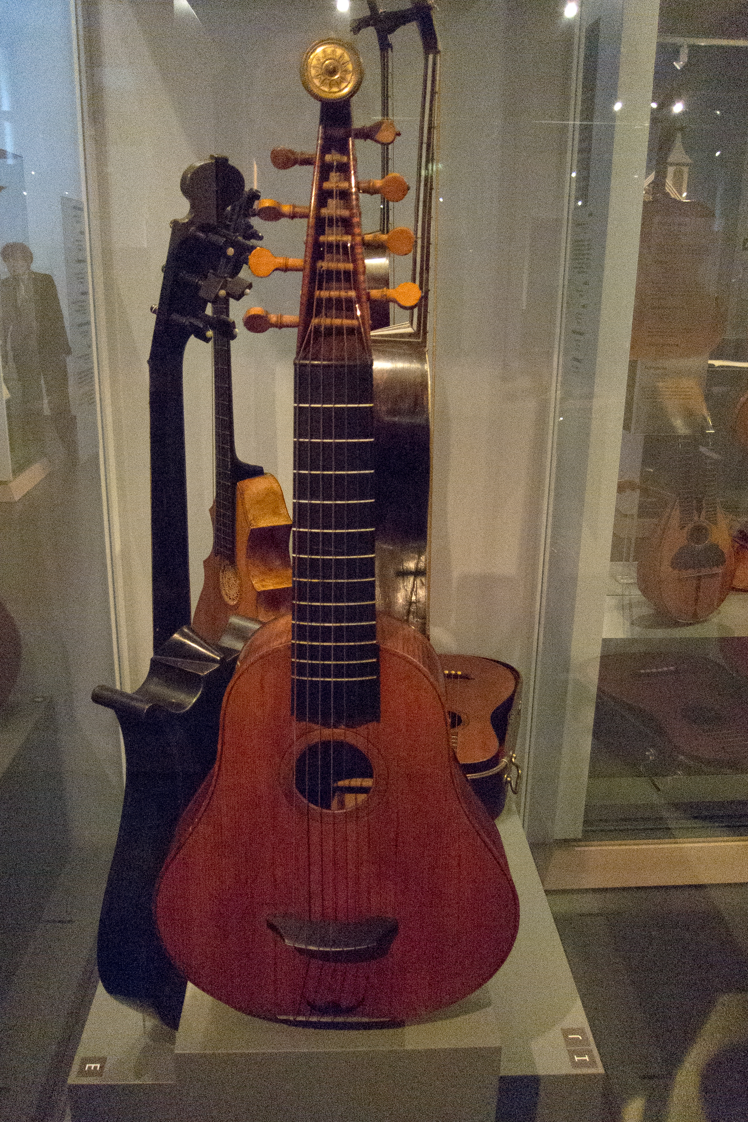 Sister (Deutsche Guitarre) (1800) by Johann Wilhelm Bindernagel, Gotha, Inv.-Nr.621, Museum für Musikinstrumente der Universität Leipzig “Antique guitar, Leipzig 2012” References Andreas Michel (2000). Inv.-Nr.621 Sister - Johann Wilhelm Bindernagel, Gotha, um 1800. Museum für Musikinstrumente der Universität Leipzig. Studia Instrumentorum Musicae.